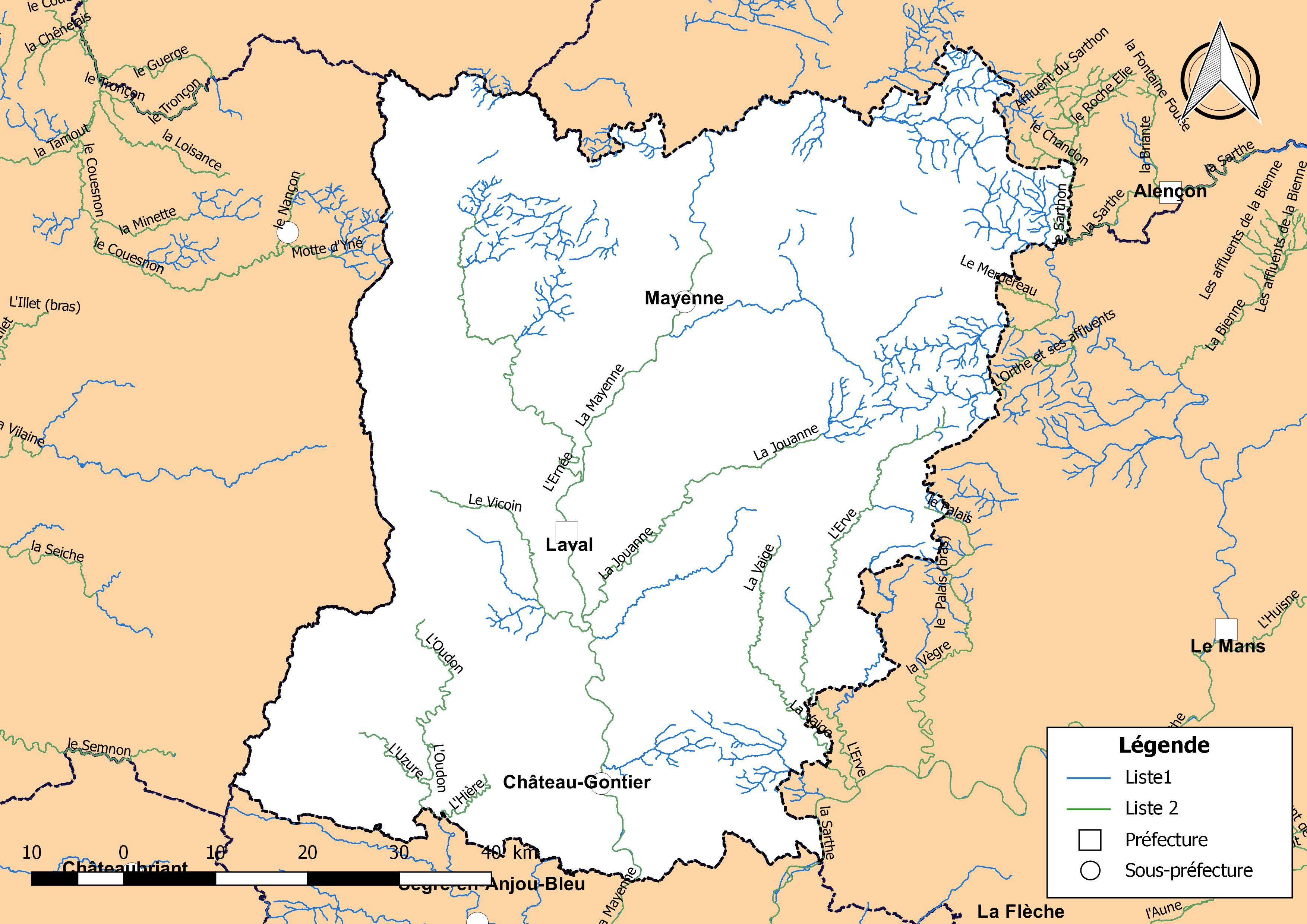 Classement des cours d'eau du département de la Mayenne (France) au titre de la continuité écologique (article L214.17 I du Code de l'environnement).